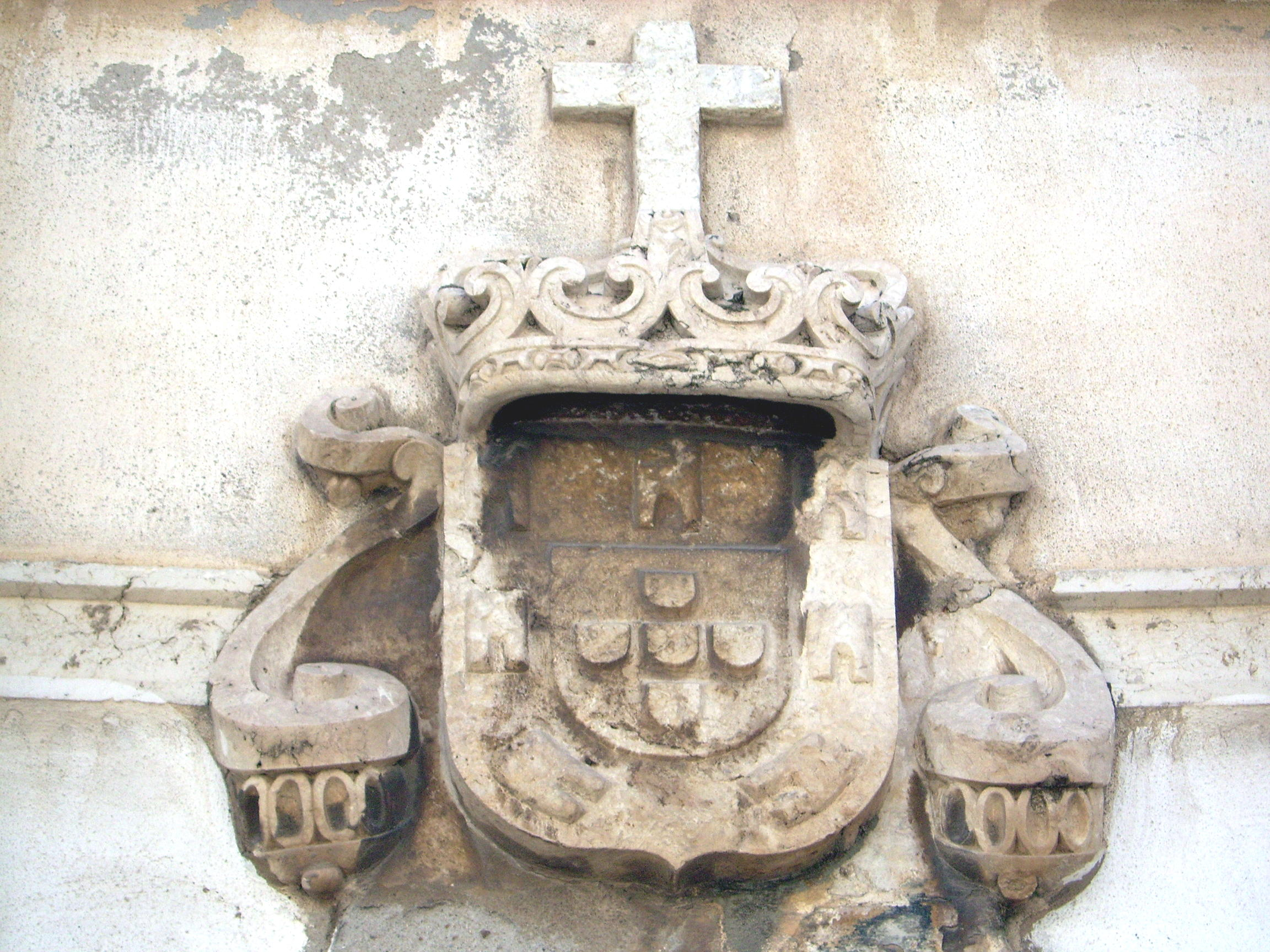 Fortaleza de Santiago - Brazão Real na porta de entrada user:sacavem